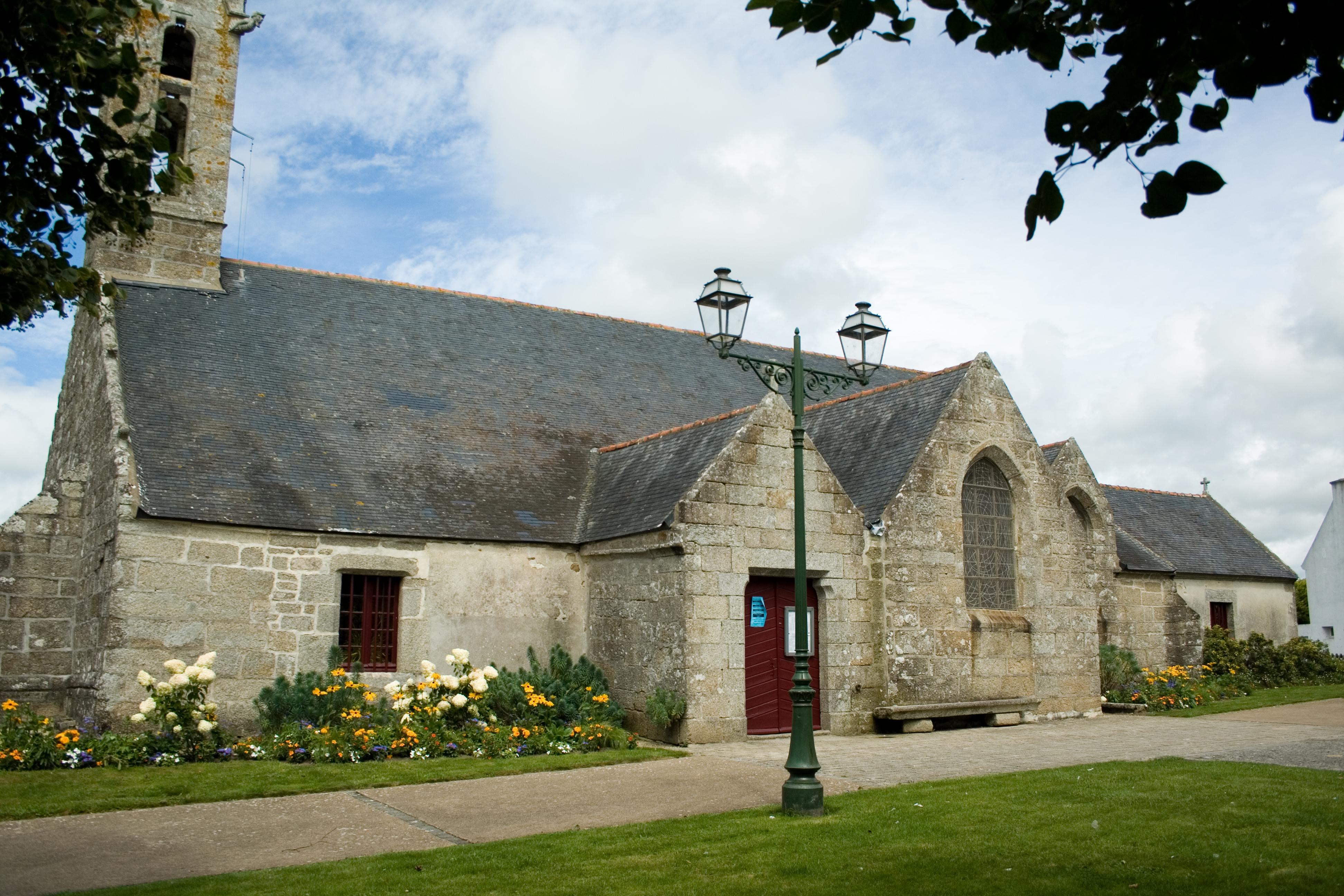 Eglise Notre Dame de Lorette, Lanriec, Concarneau, Bretagne. Le 26 juin 1968, l'église, son placître et le calvaire sont classés monuments historiques